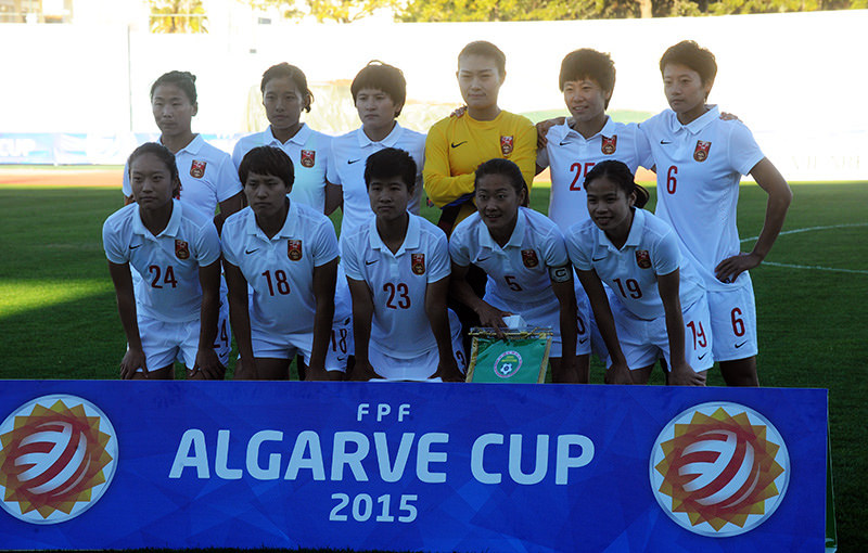 a_35_6680